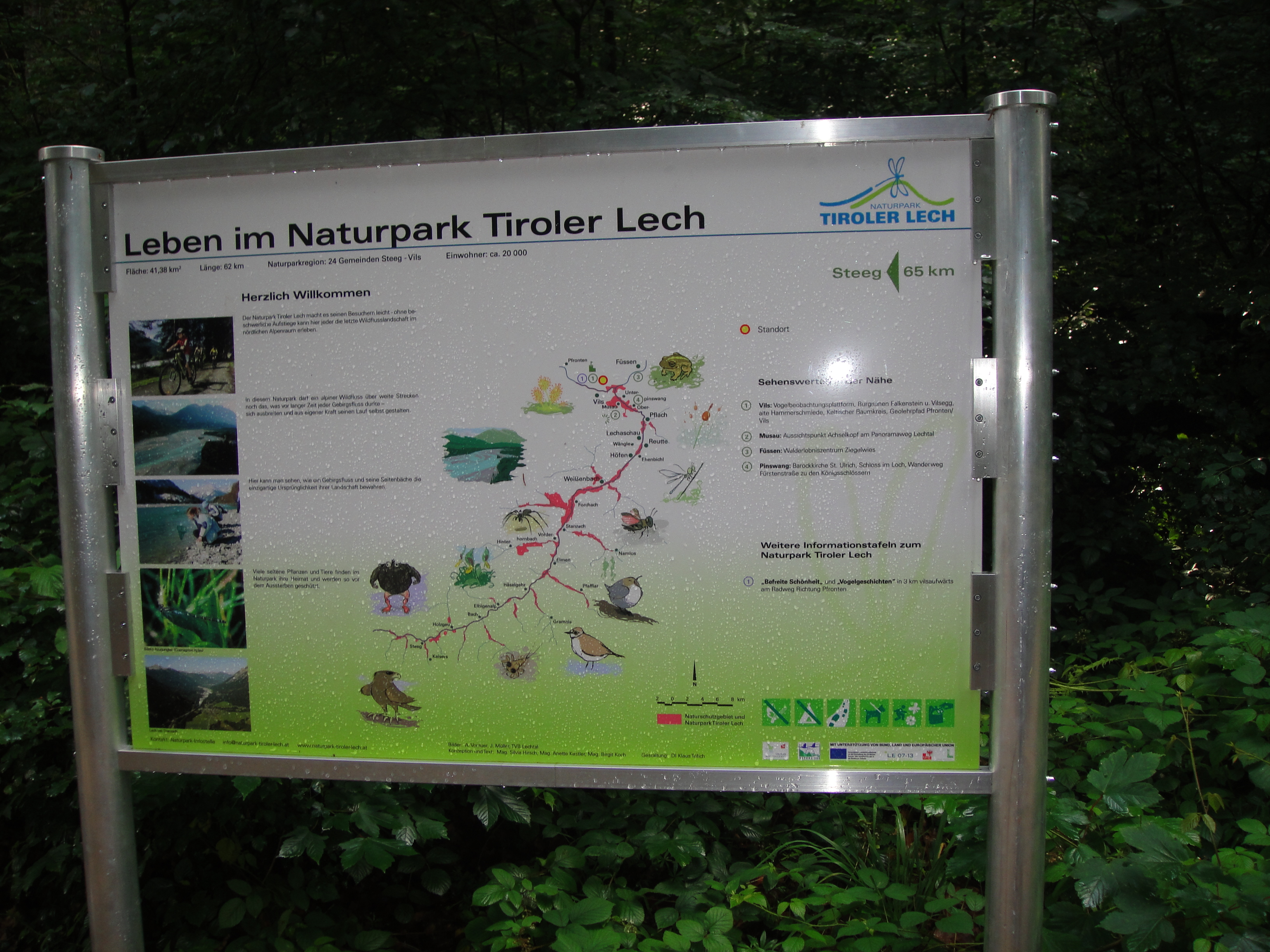 Infotafel zum Naturpark Tiroler Lech am Alatsee